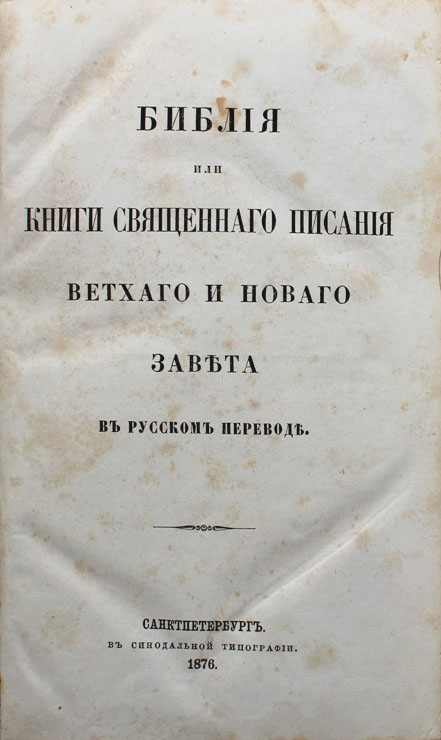 Библія или Книги Священнаго Писанія Ветхаго и Новаго Завѣта въ русскомъ переводѣ. Санктпетербургъ. Въ Синодальной типографіи. 1876.